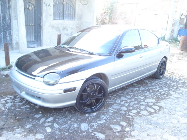 Neon Modelo 96. El Castillo, El Salto, Jalisco, Mexico.